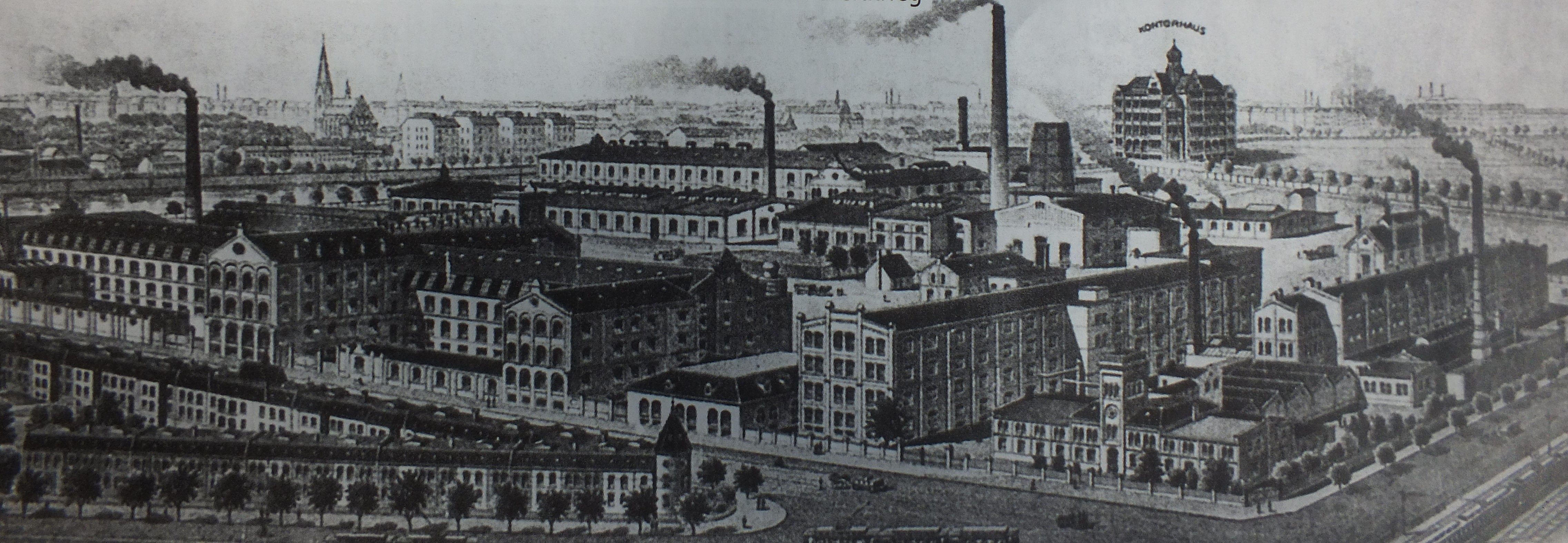 Fabrikgelände der New-York Hamburger Gummi-Waaren Fabrik - Ansicht aus Richtung Maurienstraße vor 1914.